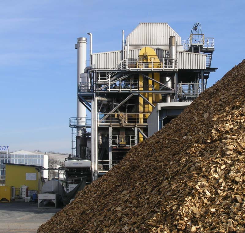 Holzvergaser Güssing 2006 eigene Aufnahme